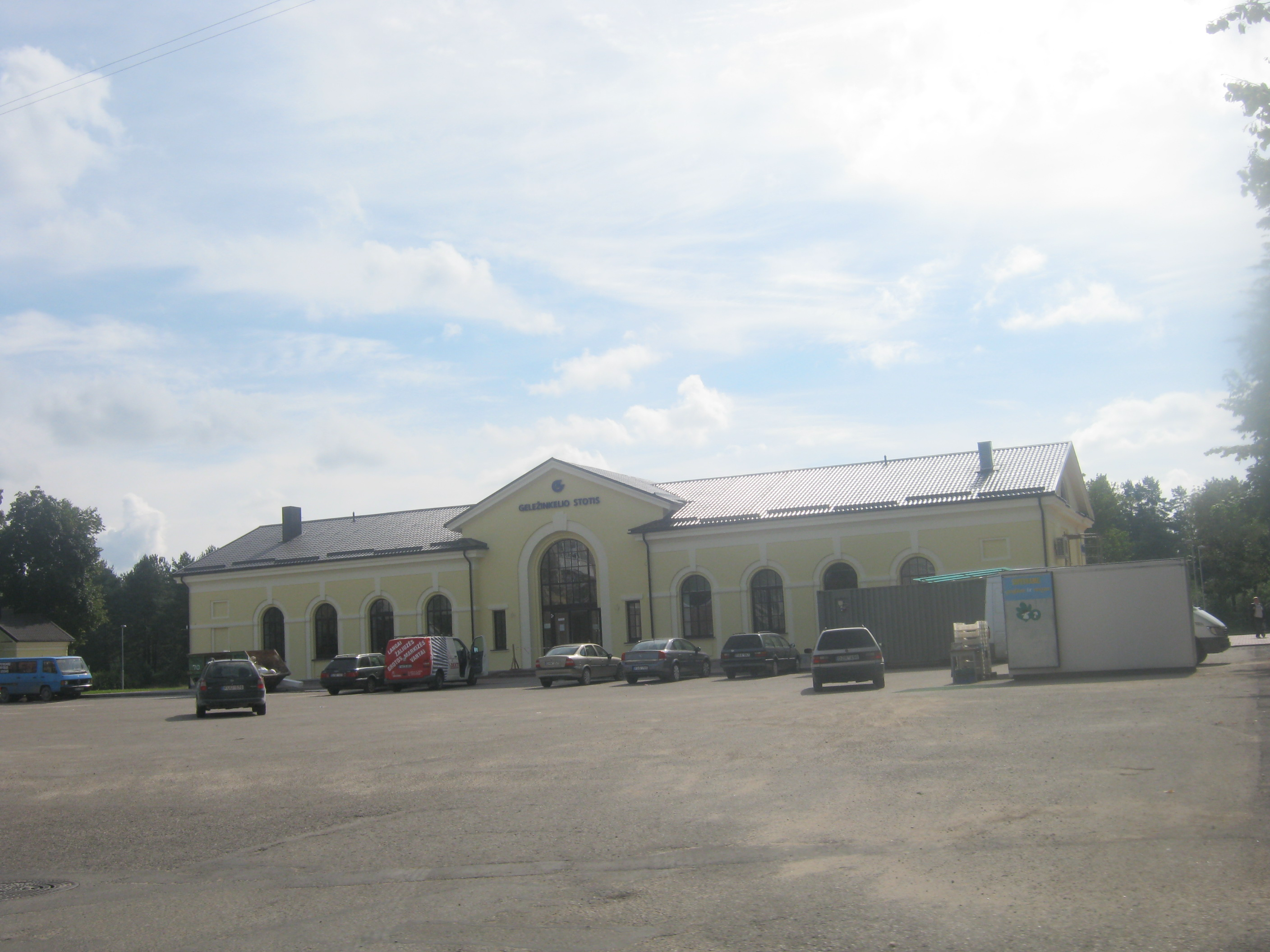 Varėna